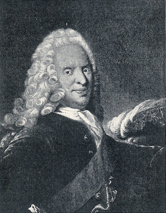 Statsminister greve Otto Thott. 1703-1785. Efter kobberstik af Johan Martin Preisler